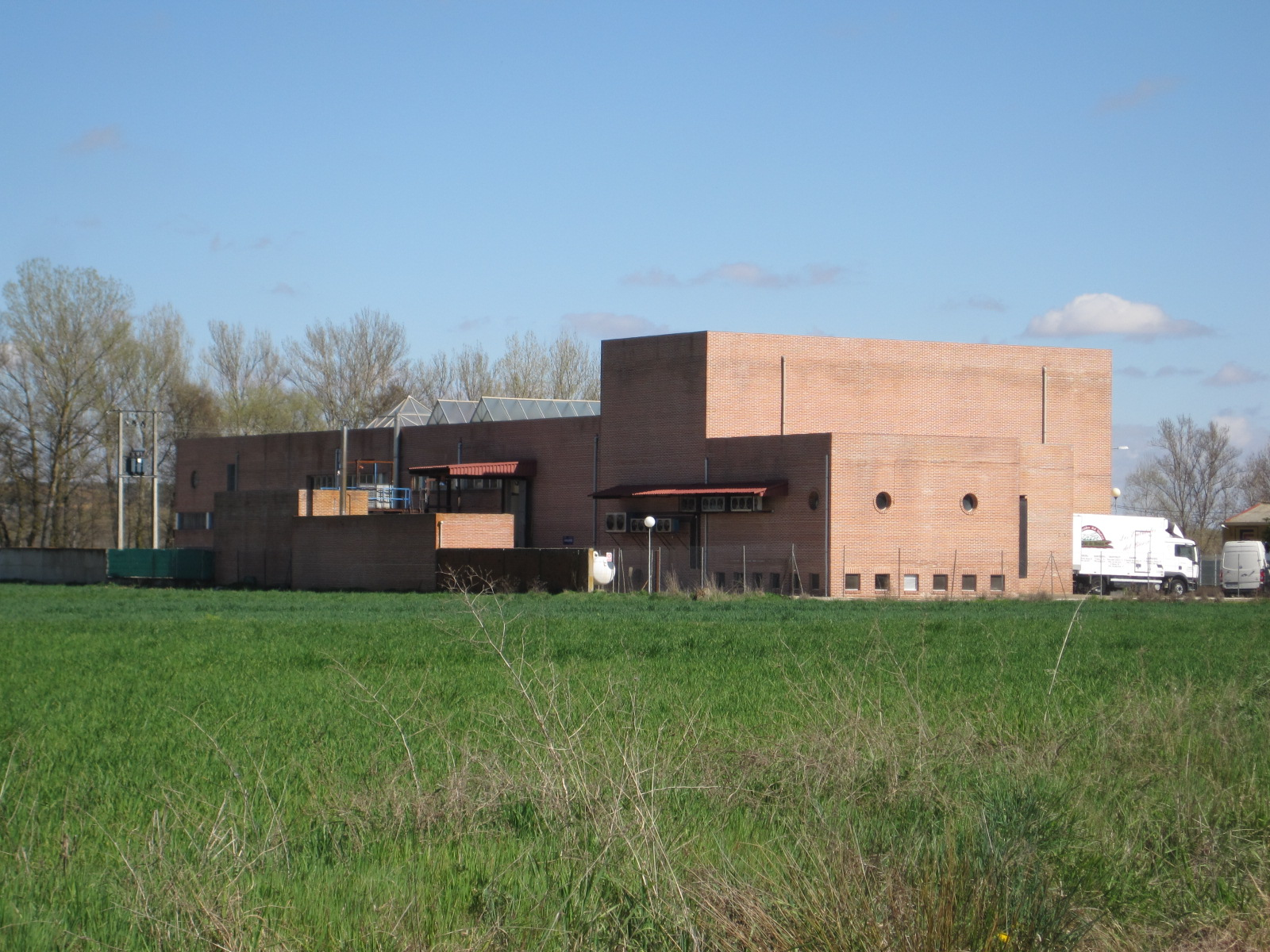 Matadero comarcal de Astorga (provincia de León, España).